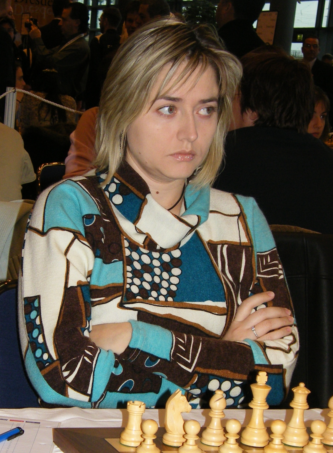 Natalja Schukowa bei der 38. Schacholympiade in Dresden 2008